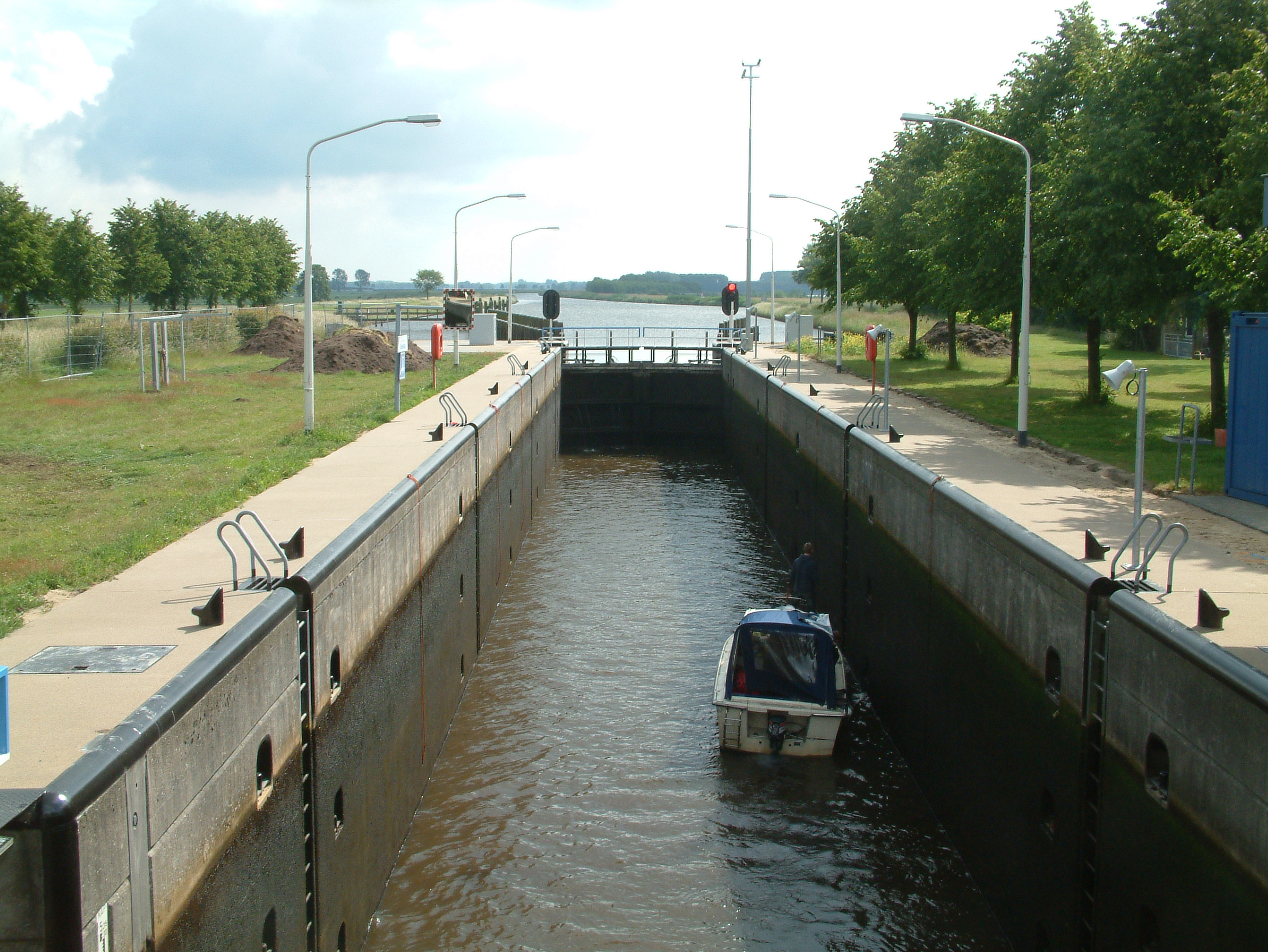 De Ossesluis in de Hoogeveensche Vaart